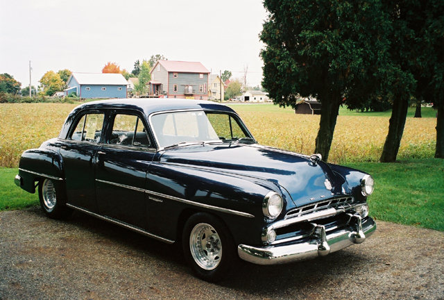 1952 Dodge Meadowbrook 4 dr Sedan